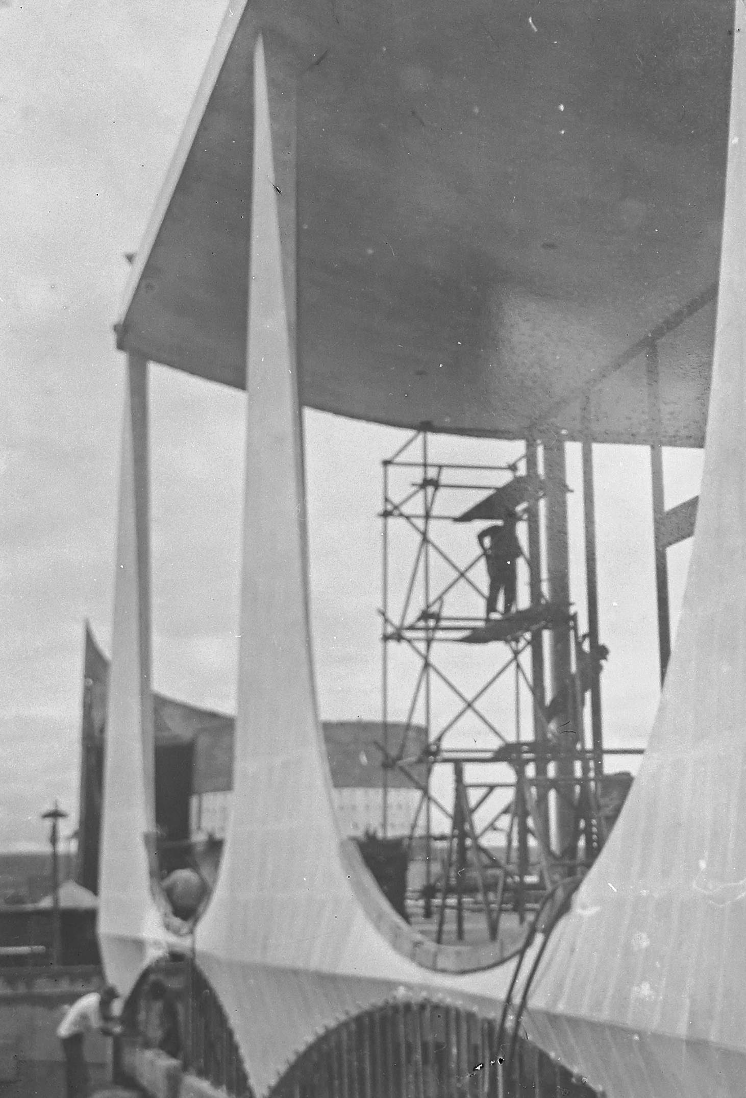 Vistas das obras do Palácio da Alvorada_7